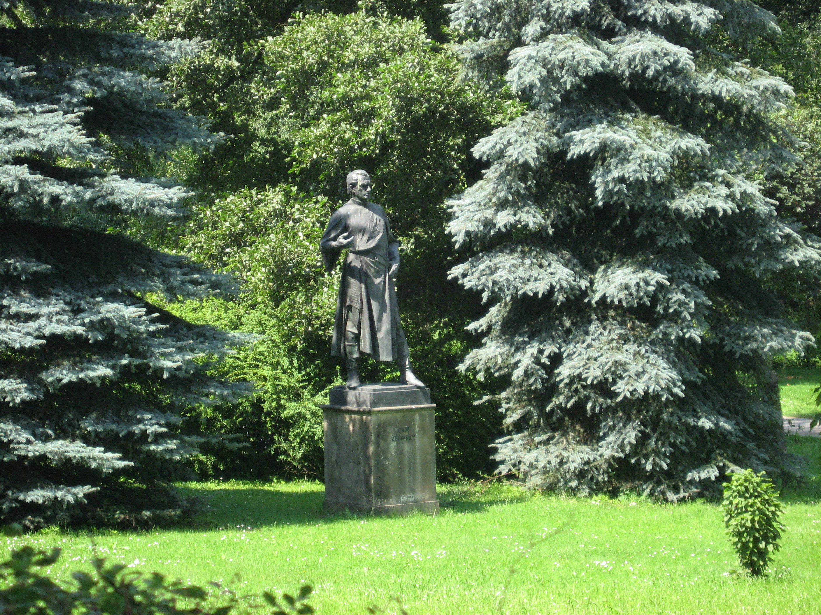 Želiv